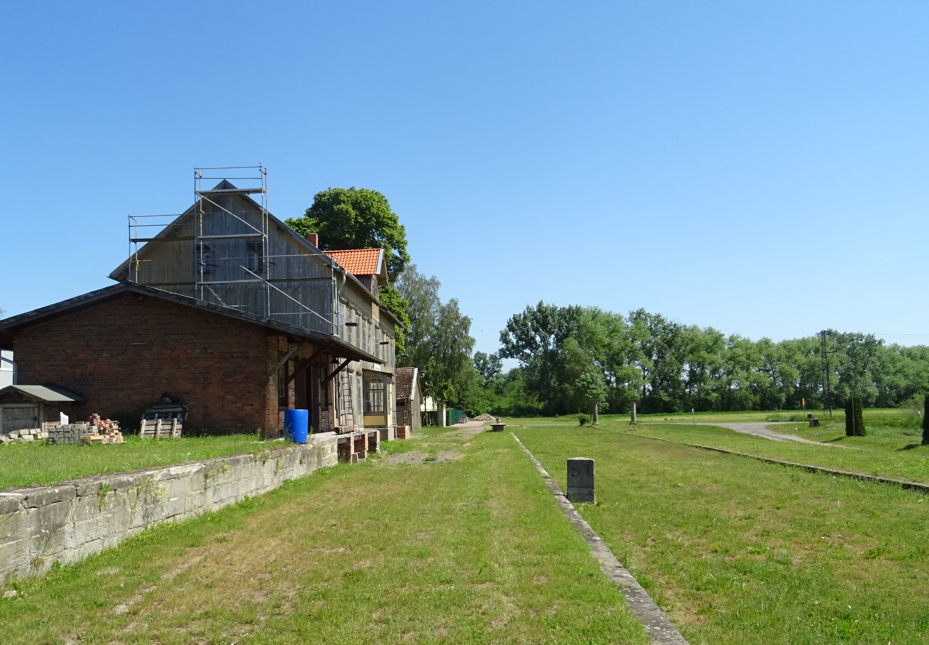 Bahnhof Gunsleben, denkmalgeschützt, ehemalige Gleisanlagen